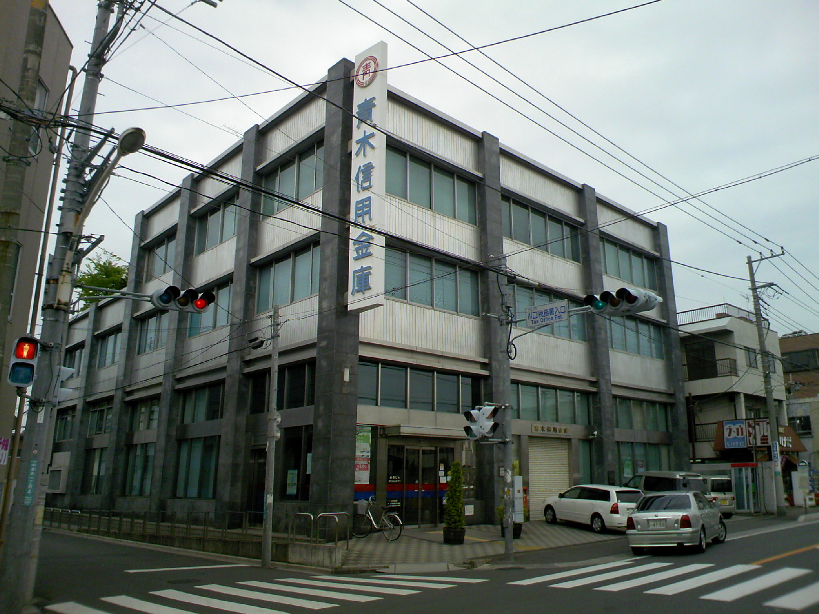 青木信用金庫 本店